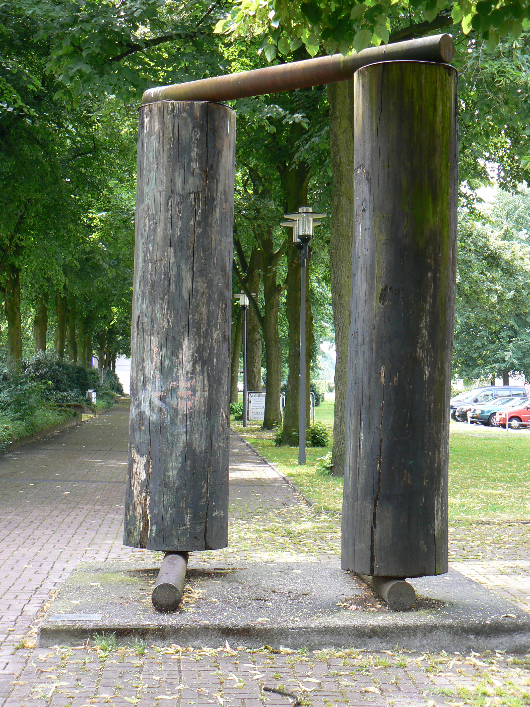 Collection: Skulpturenmuseum Glaskasten Location: City Center Marl/Germany Sculpture: Großes Tor (1984) Sculptor: Jan Meyer-Rogge